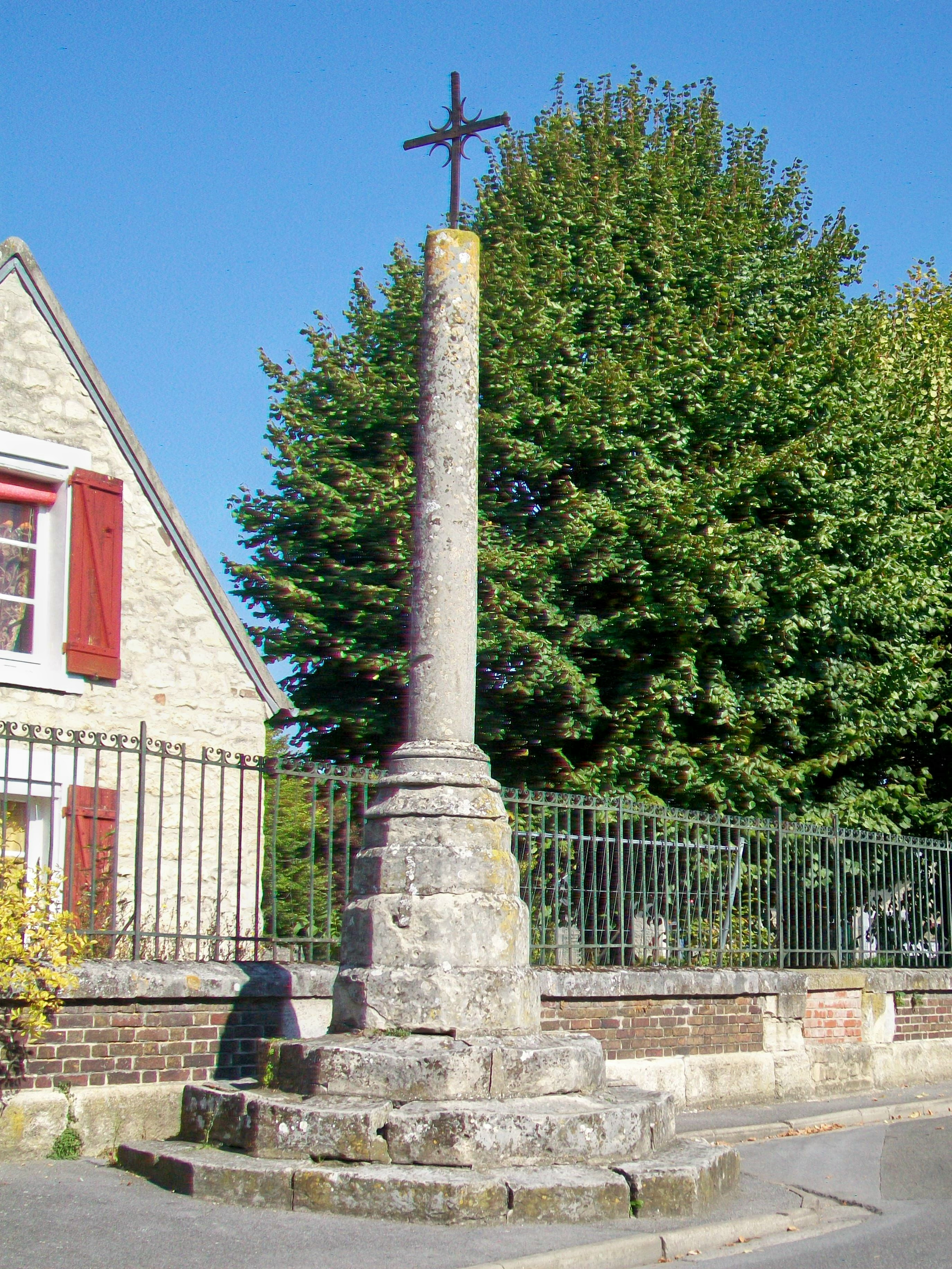 L'ancienne croix de cimetière (le cimetière ayant été déplacé), place de l'Eglise.